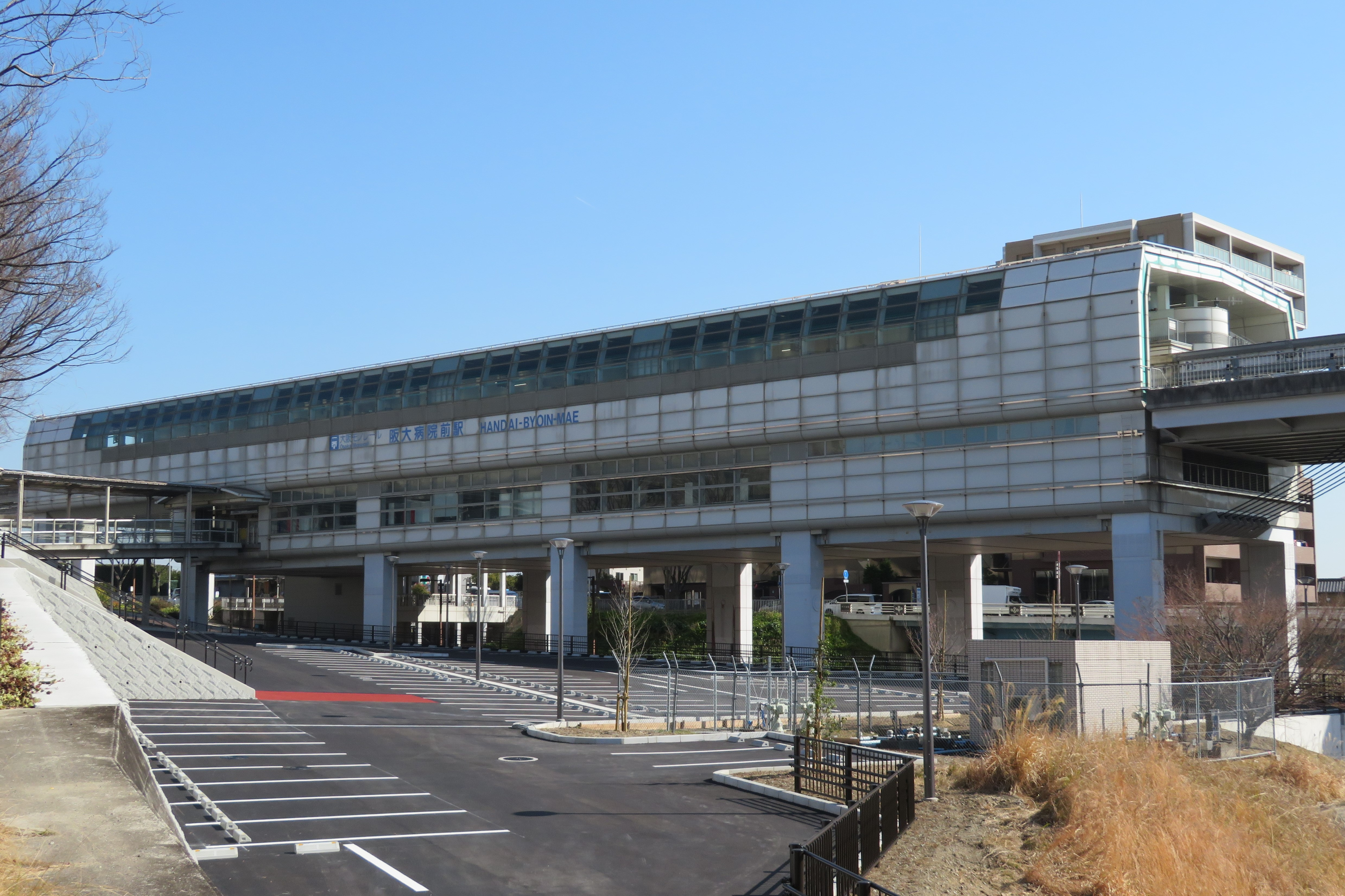 大阪モノレール阪大病院前駅